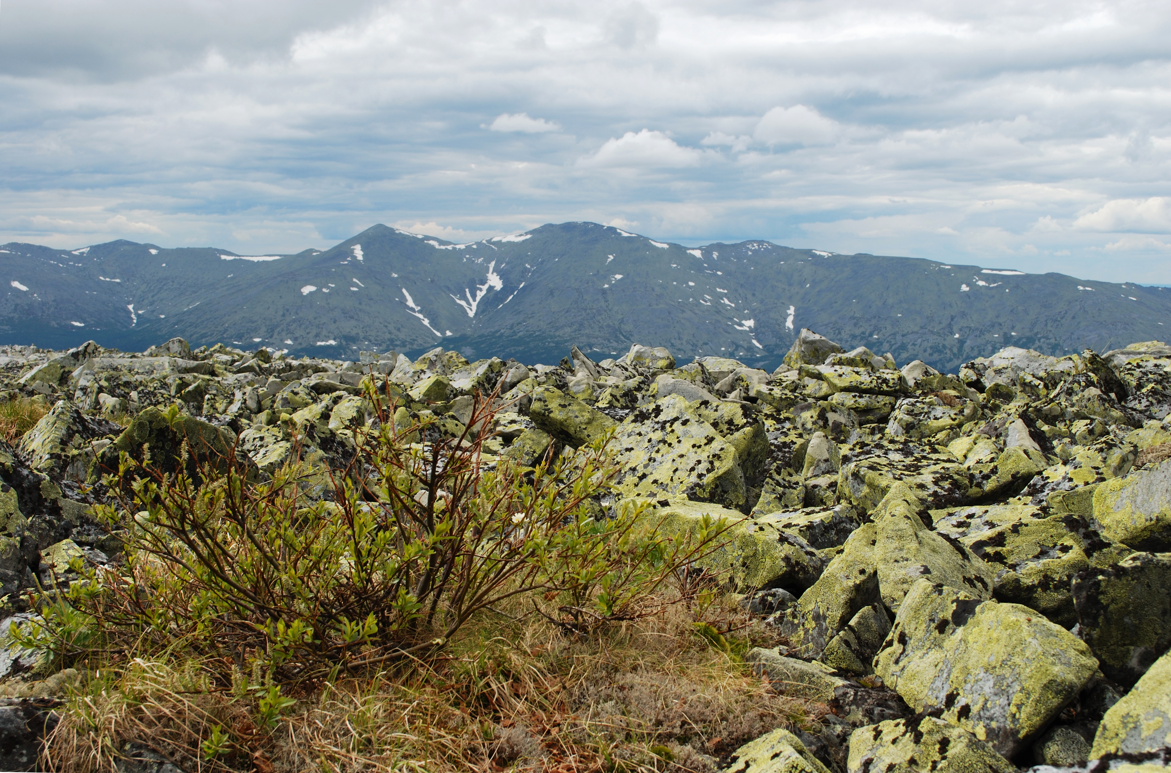 Вишерский заповедник, Красновишерский район This image is related to the protected area of Russia number 5900186